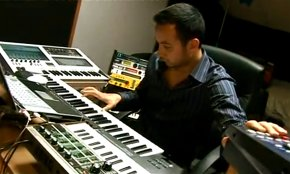 Skalp compose un morceau en 5 minutes en direct pour Street Live